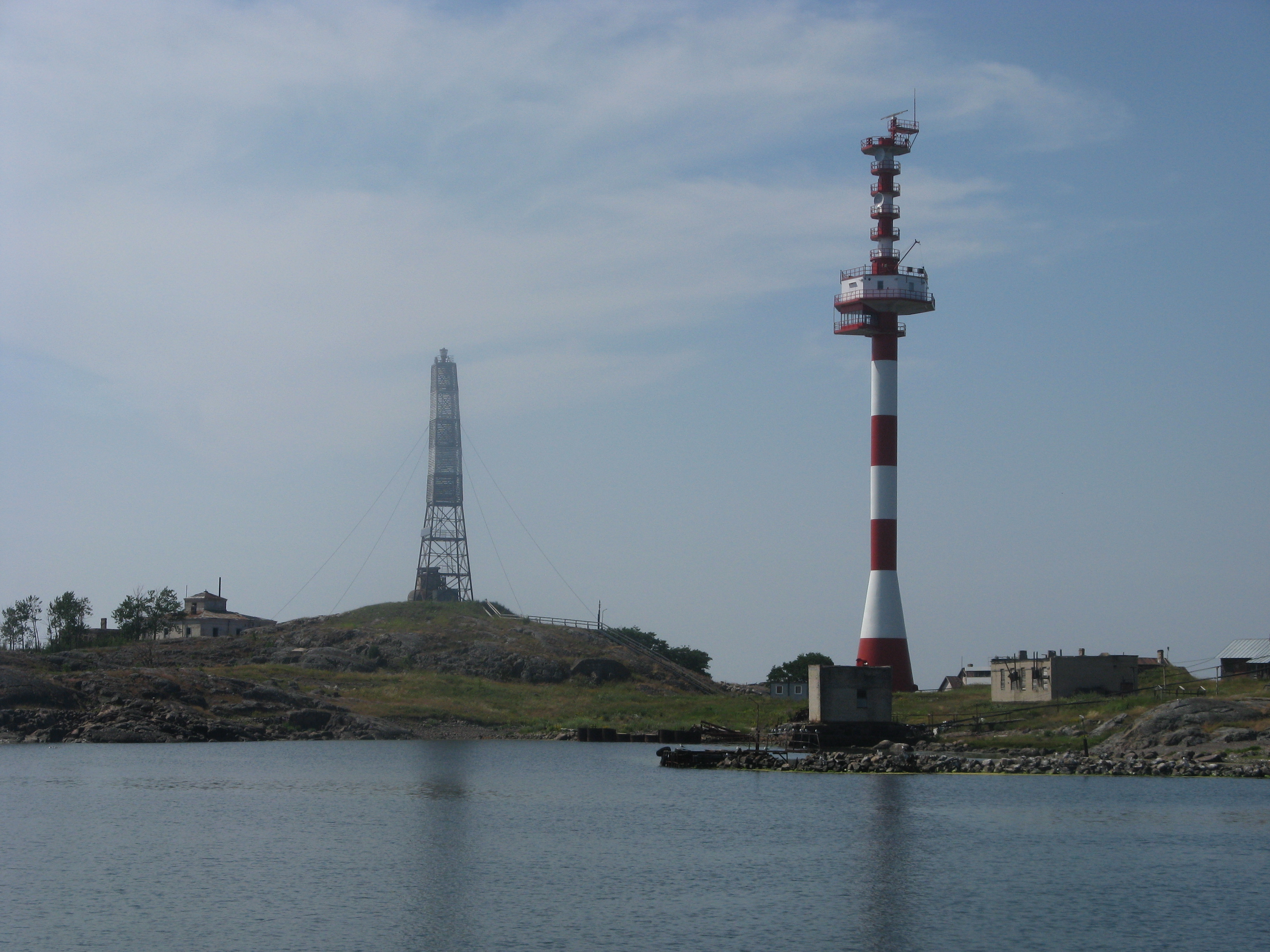 о. Соммерс /I. Sommeri